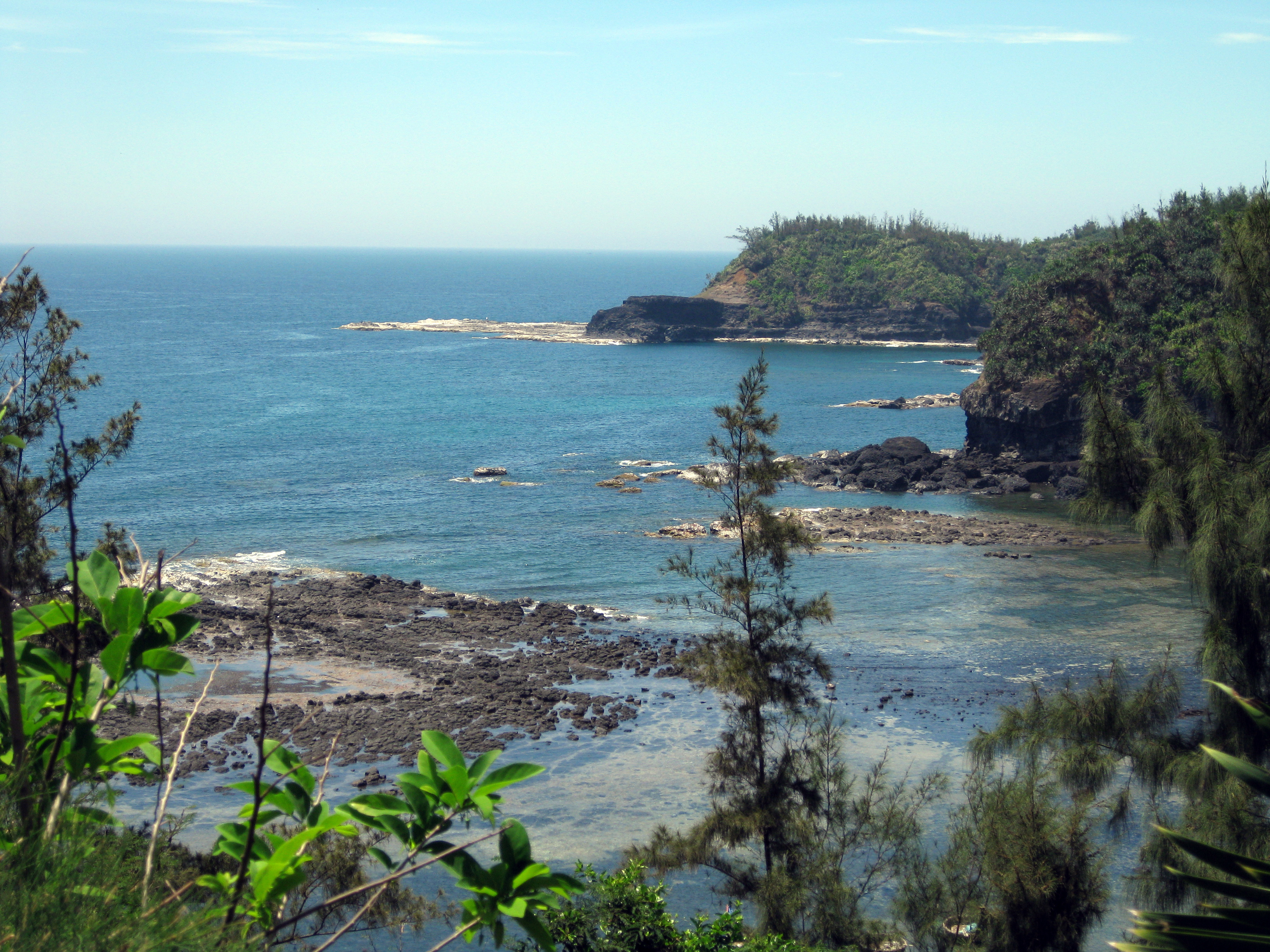 Biển Bình Châu, huyện Bình Sơn, tỉnh Quảng Ngãi